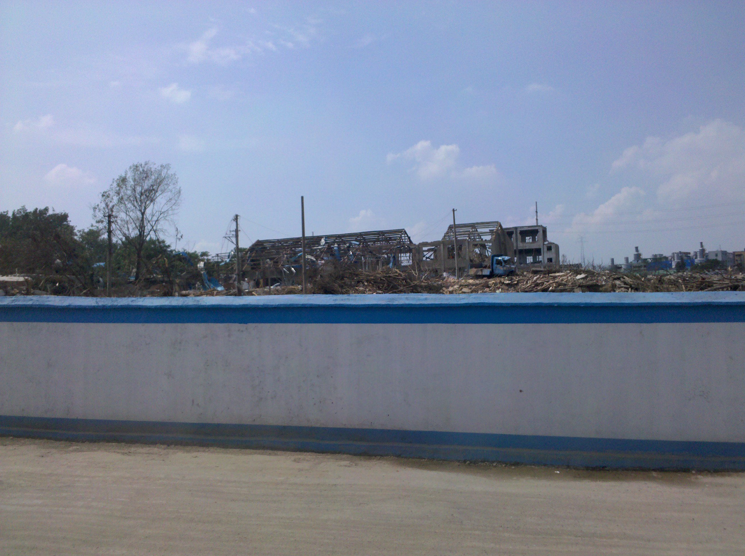 爆炸现场一侧已经用围墙围了起来，内部有相当多的建筑坍塌